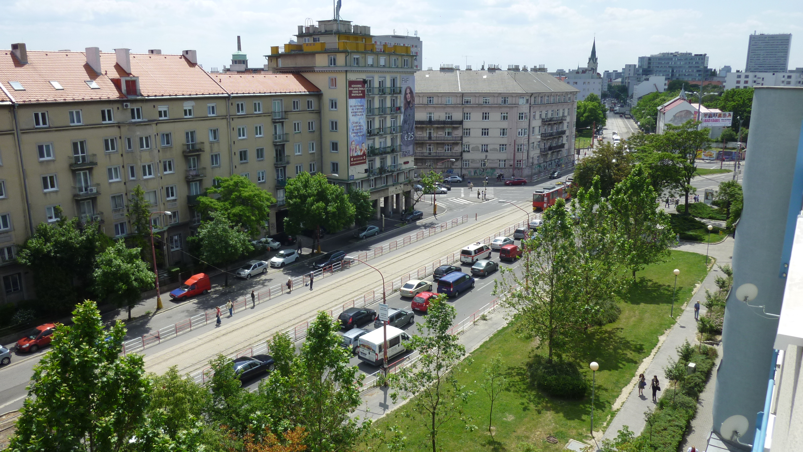 ZÁSTAVKY ELEKTRIČIEK NA RAČIANSKOM MÝTE